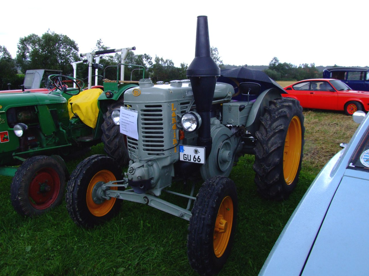 Landini L25 mit 25 PS bei 800 U/min., Baujahr 1954, Antriebsart: Glühkopfmotor, 1-Zylinder liegend, 2-Taktverfahren, Hubraum: 4,312 ltr., V max: 15 km/h, Anhängelast: 4800 kg